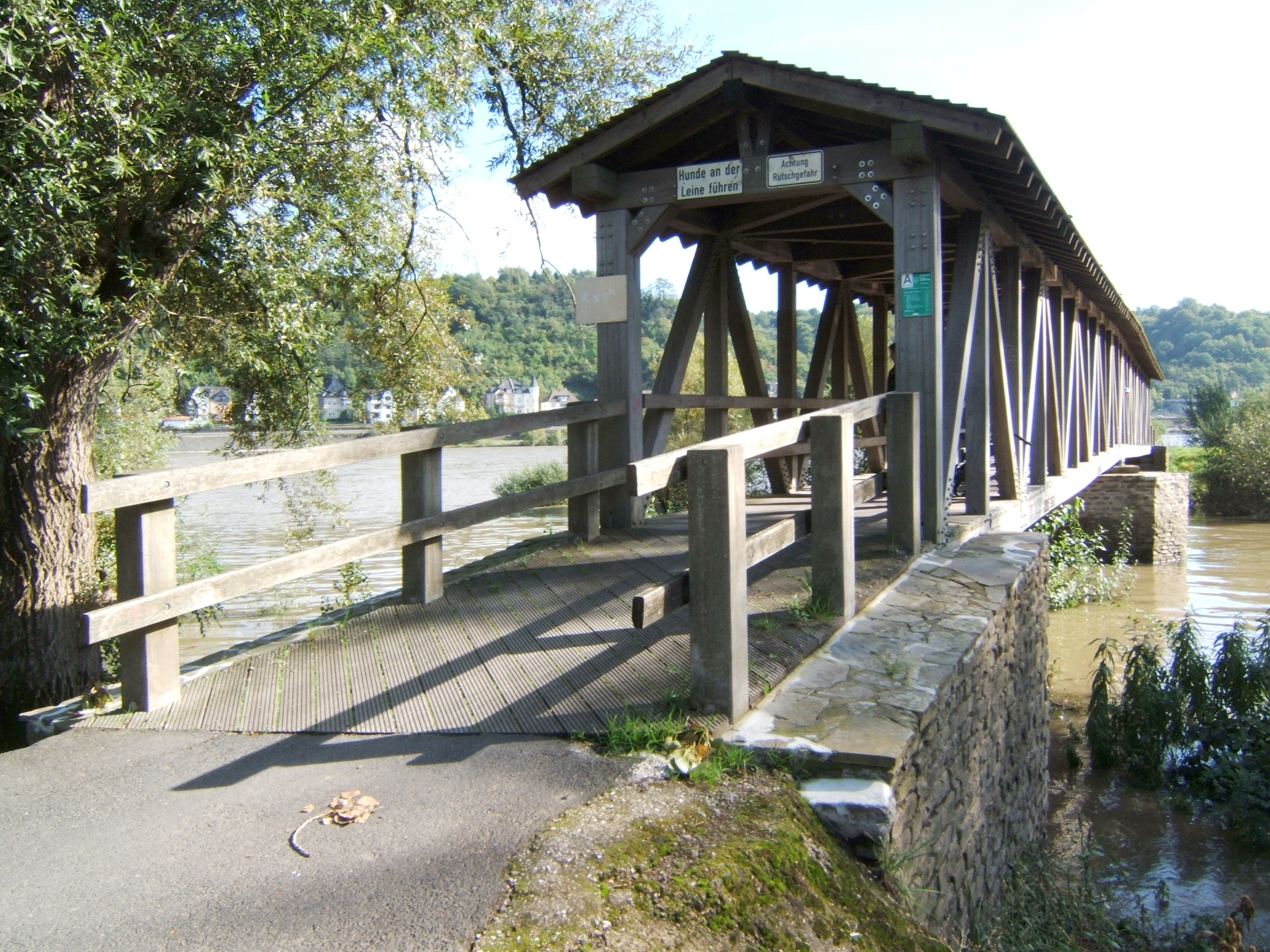 Ahr-Brücke bei Kripp, im Hintergrund die Mündung in den Rhein